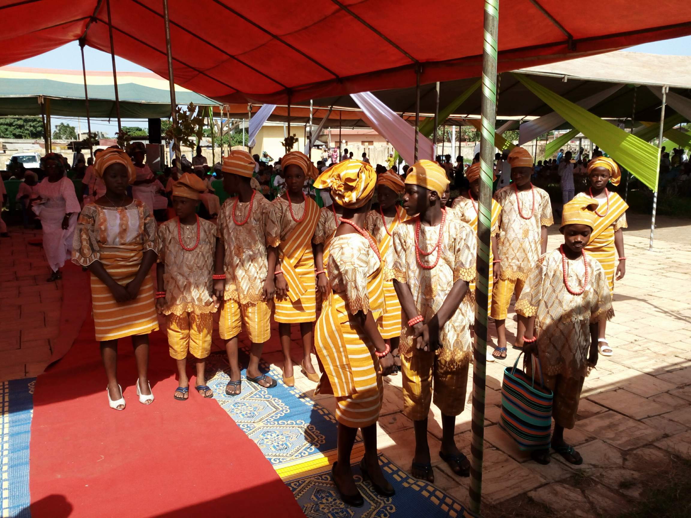 La cérémonie de mariage en milieu culturel yoruba et Nago est très particulier. Pour demander une fille en mariage, l'homme doit payer certaines choses comme de l’igname, des fruits, des pagnes et tout élément qui s'avère nécessaire pour le soin d'une femme. Alors le jour j'y l'homme et ses amis doivent se prosterner face contre terre devant les parents de la fille.